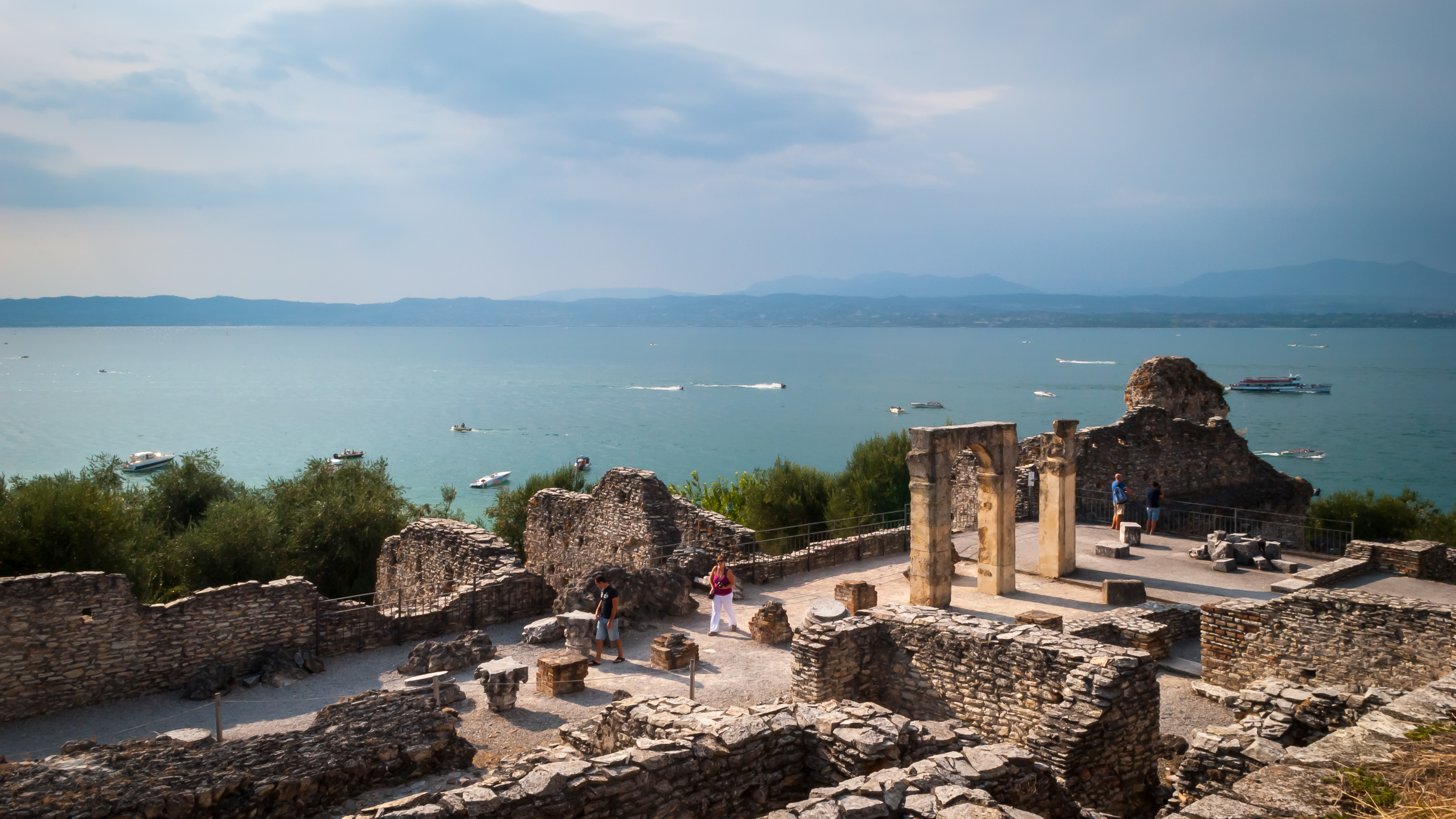 Area archeologica Grotte di Catullo This is a photo of a monument which is part of cultural heritage of Italy.